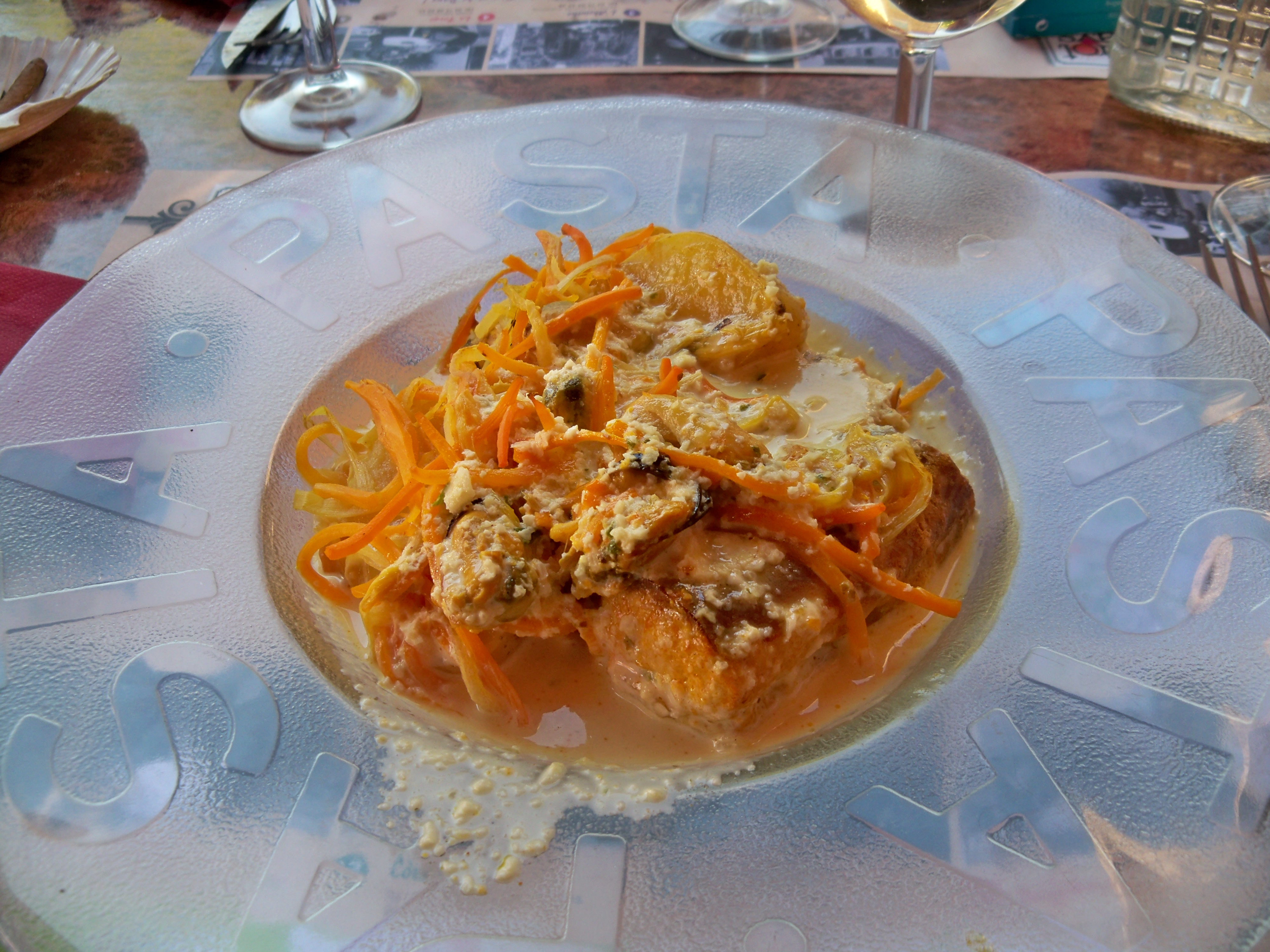 Bourride de fruit de mer, spécialité provencale